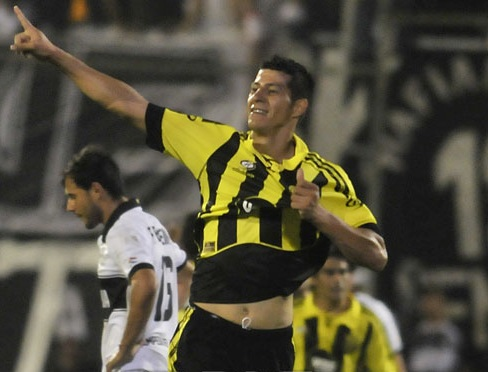 Centurión celebrando un gol